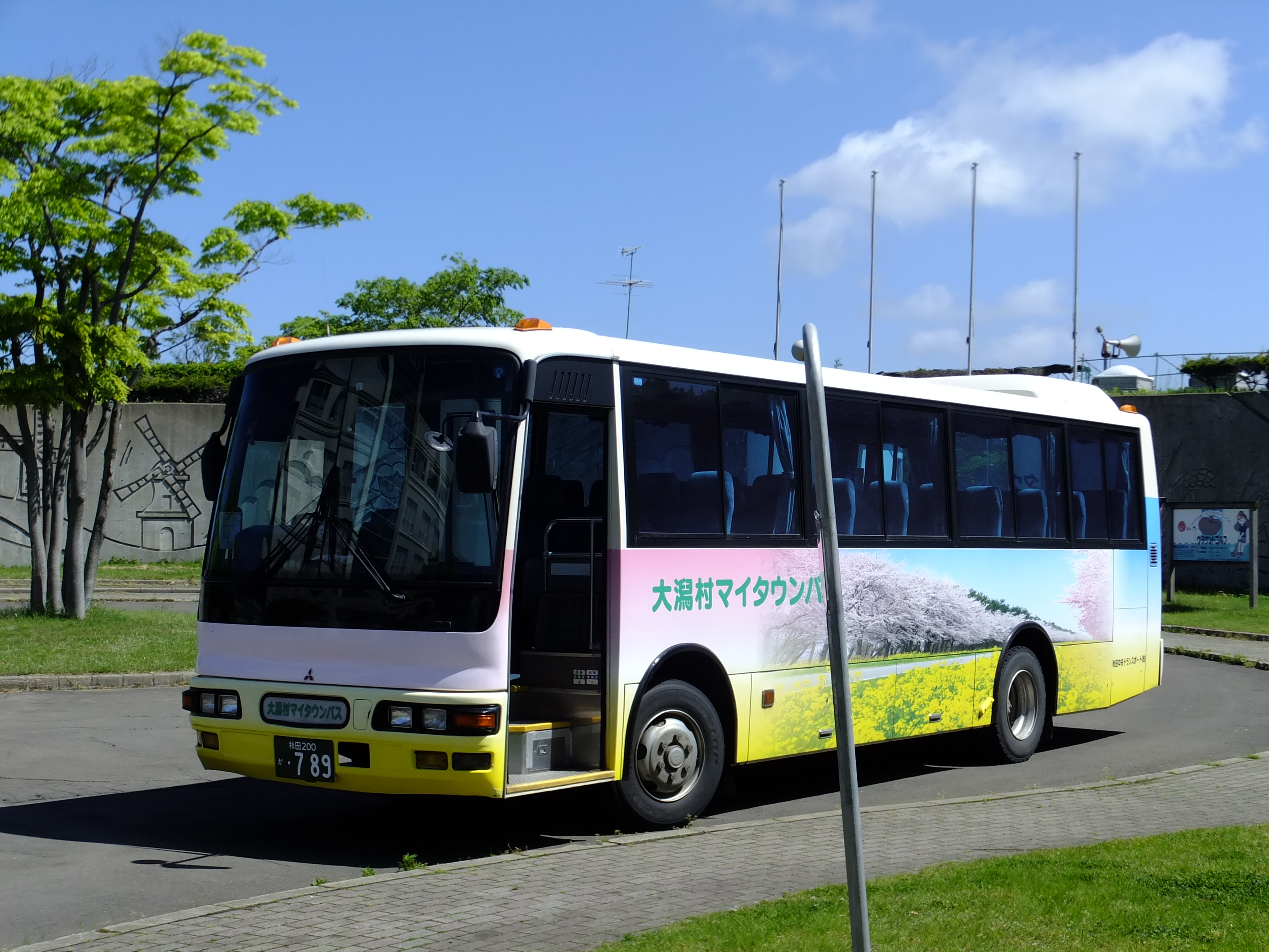 大潟村マイタウンバス。秋田中央交通の大潟村内に乗り入れる路線に廃止にともない代替して運行開始したバスで、秋田中央トランスポートに委託されている。